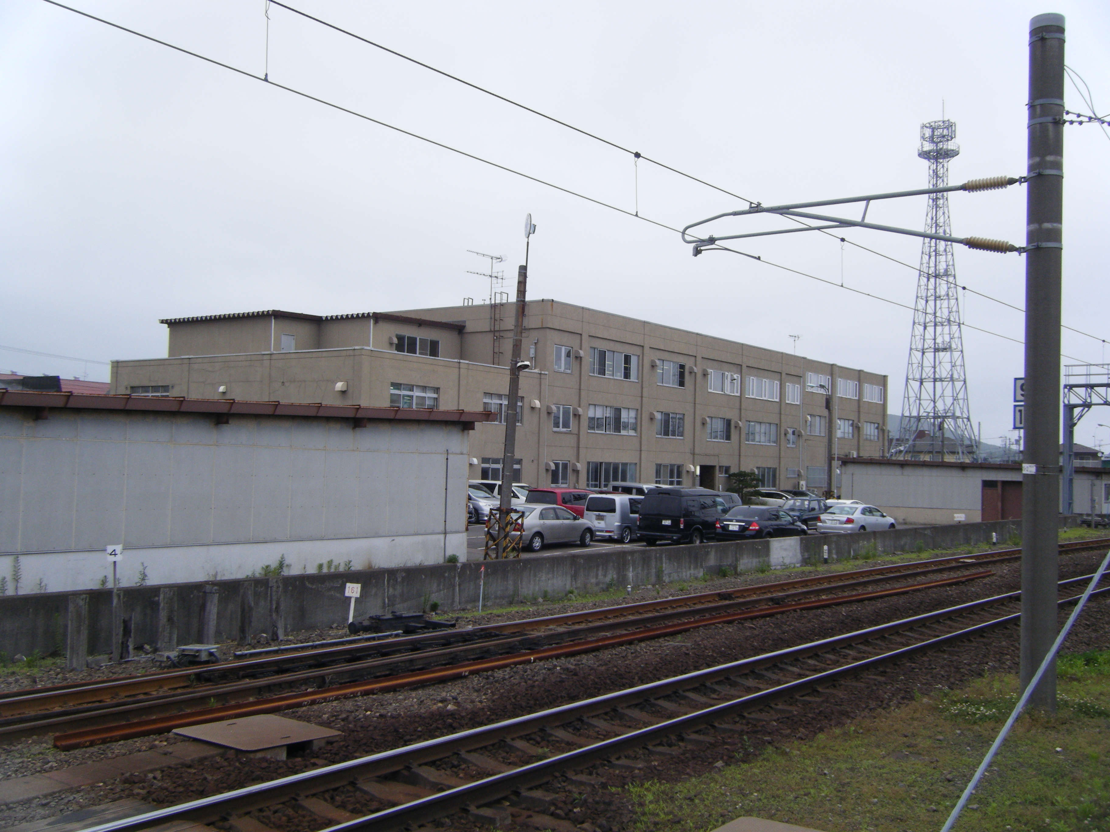 室蘭運輸所外観。東室蘭駅ホームより撮影。